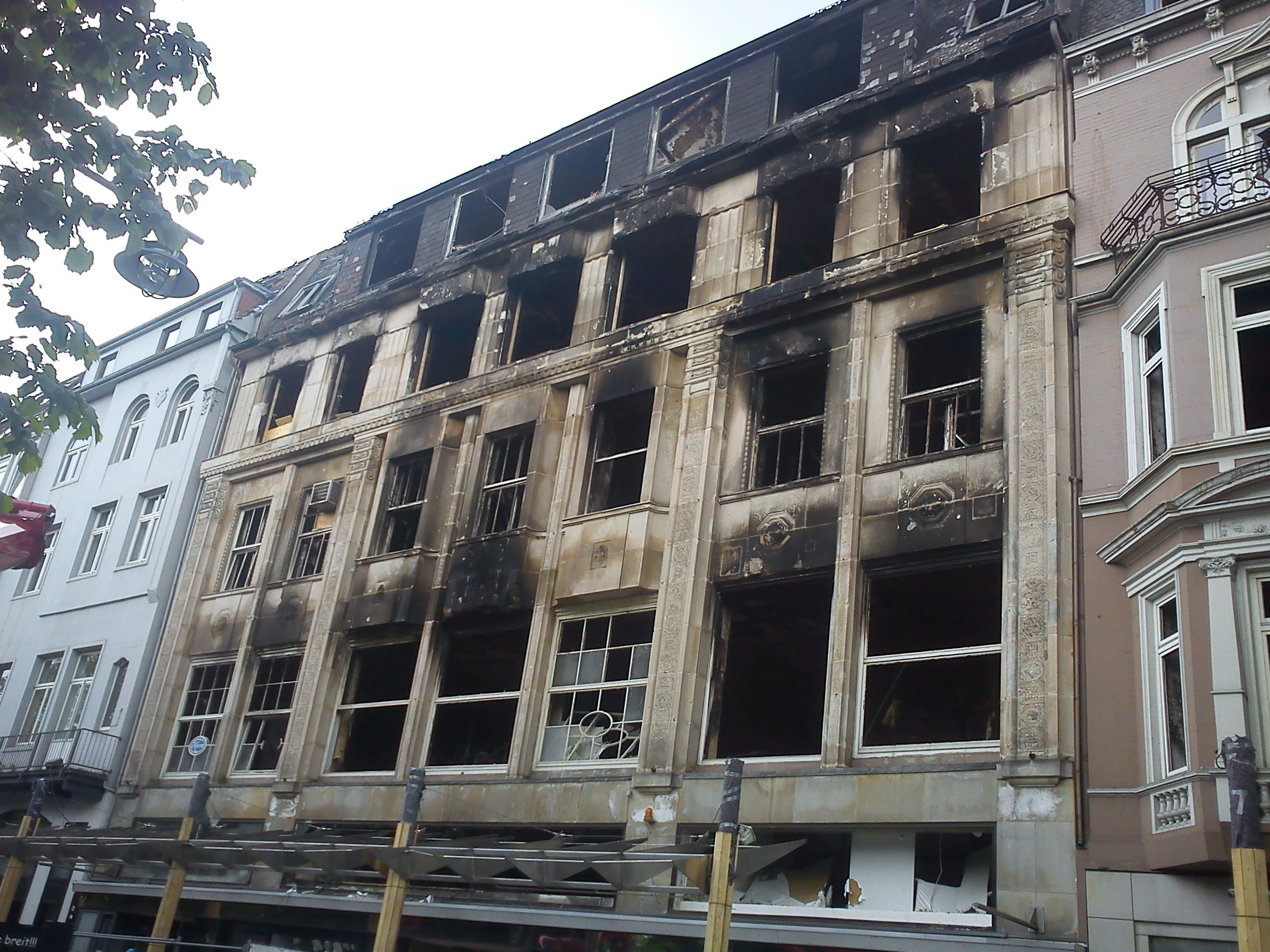 Ausgebranntes Geschäftshaus